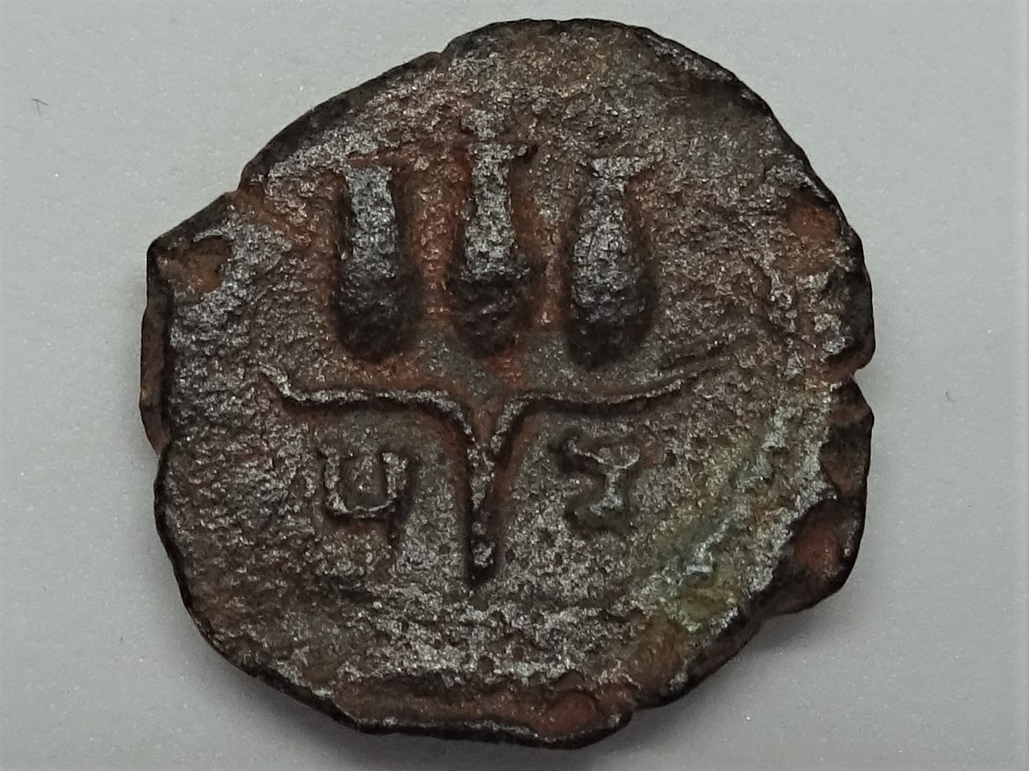 Hemhem-Krone auf Bronzemünze aus Alexandria, z.Zt. Trajans, Kampmann/Ganschow 27.574